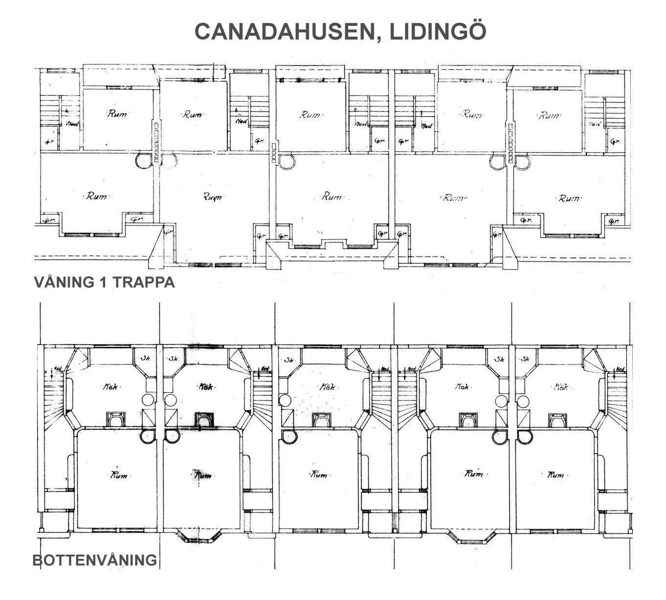 Canadahusen ritning, bottenvåning och vån 1 trappa